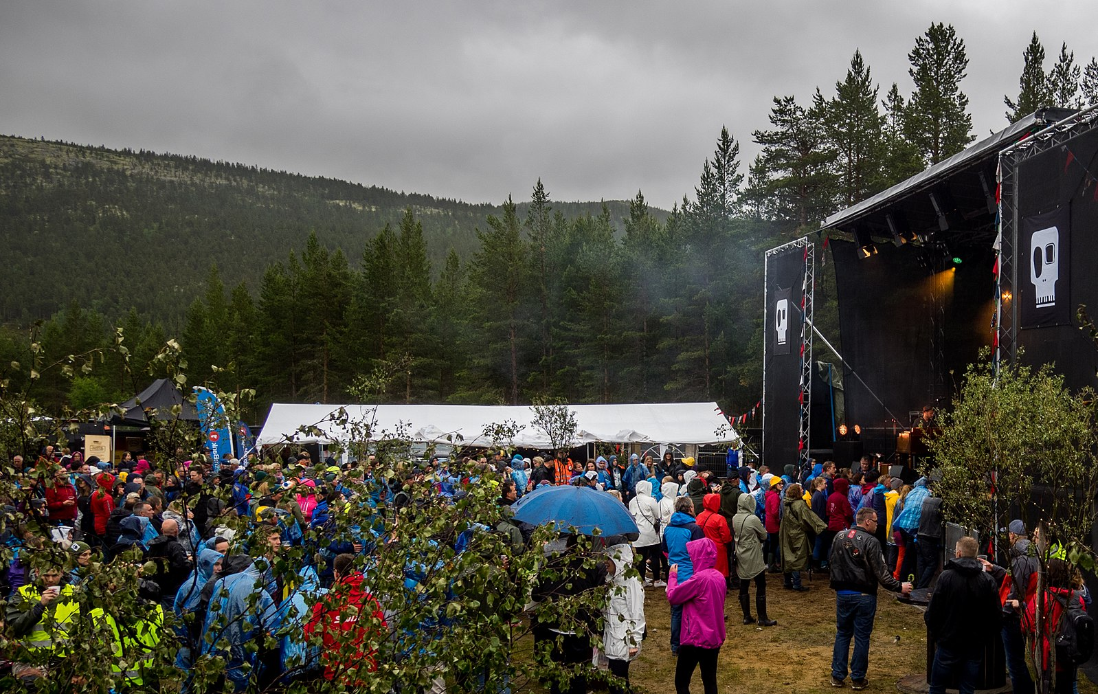 livestock2017